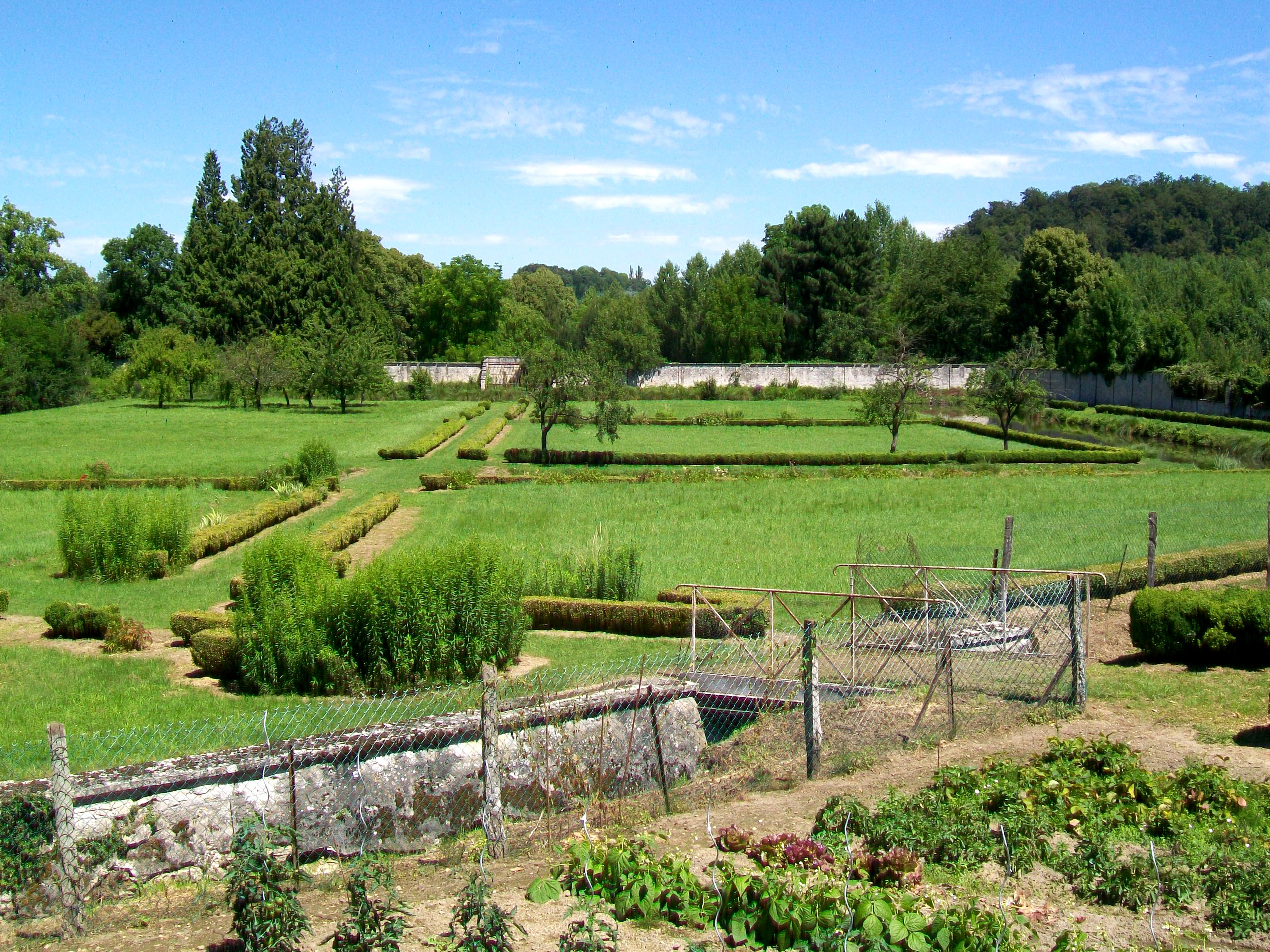 L'ancienne basse-cour du château, lieu où se trouvait le château médiéval puis la ferme du château. C'est aujourd'hui un jardin potager transformé en jardin d'agrément.